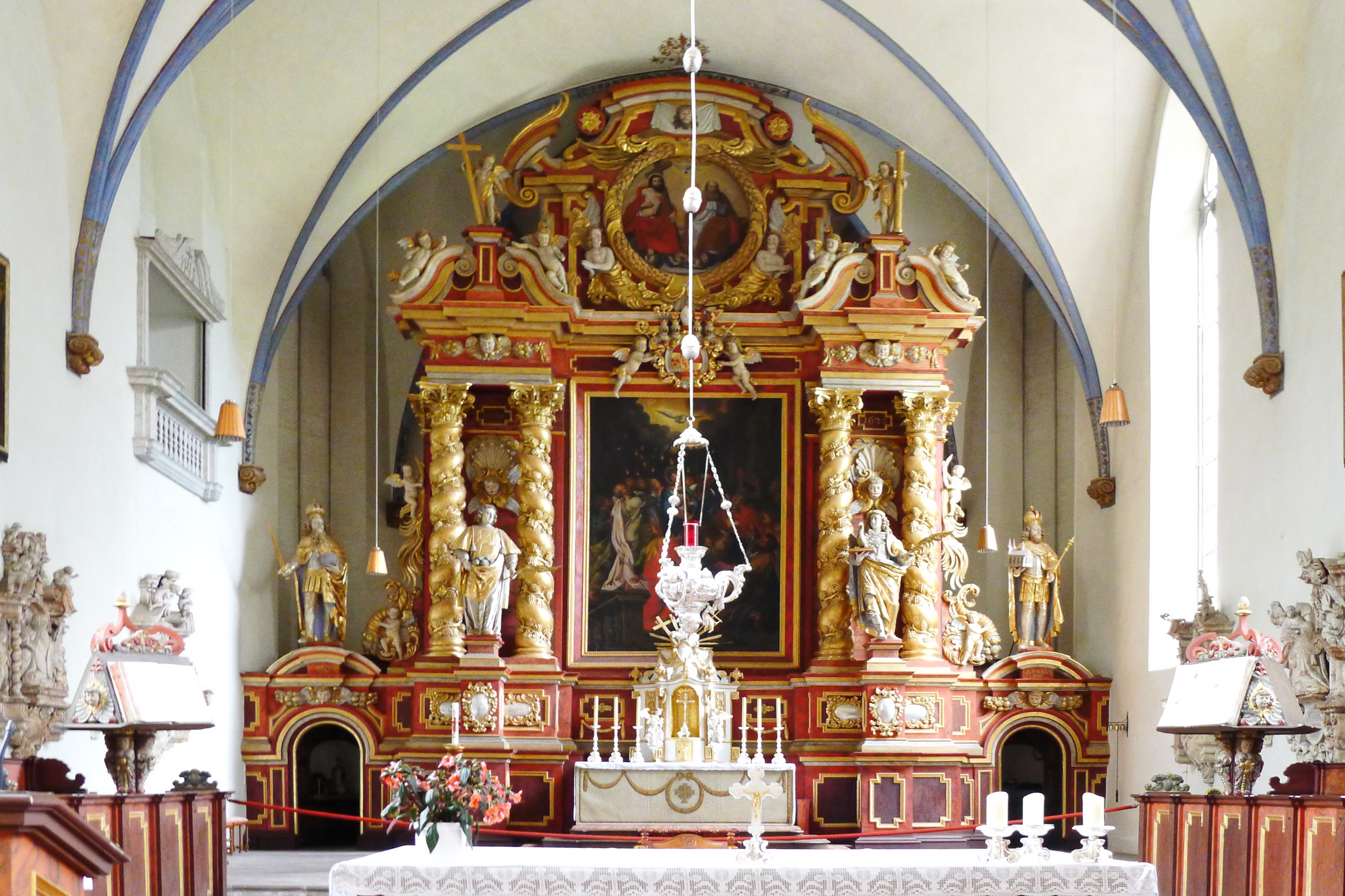 Hochaltar der Abteikirche